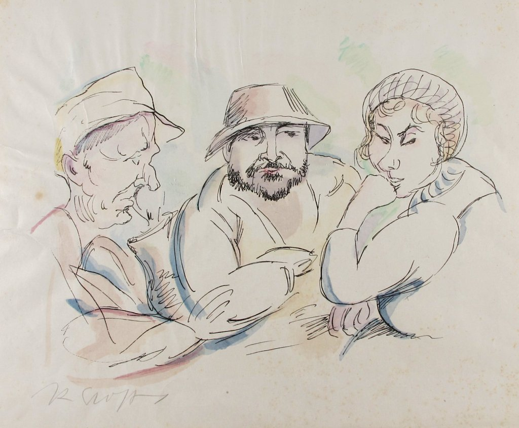 Von links: Konrad von Kardorff, Hans Purrmann und Susi Zimmermann. Lithographie von Rudolf Großmann, 33.5 cm - 41 cm (13.19 inch-16.14 inch)